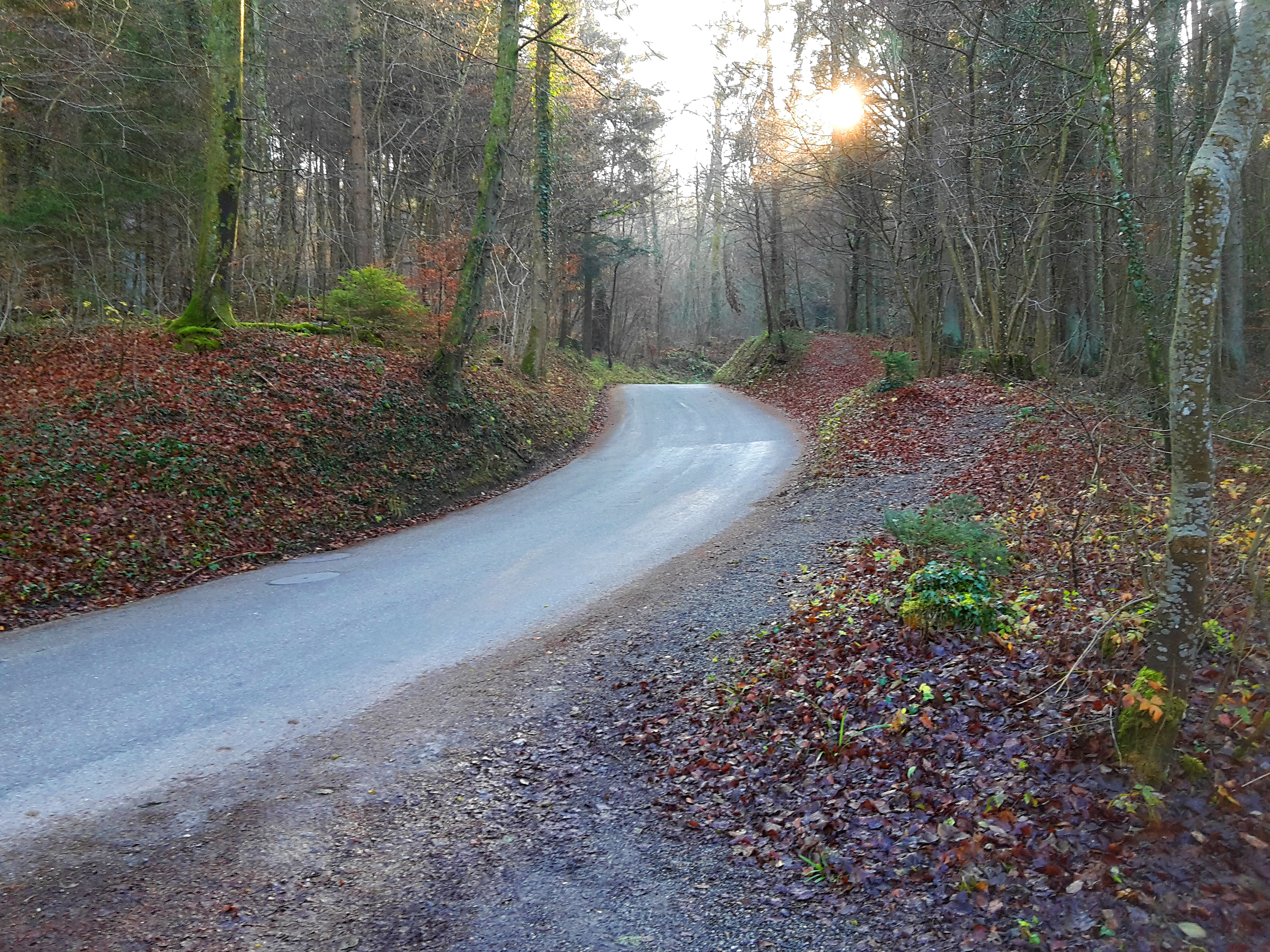 Ostrampe des Heitersbergpasses bei Spreitenbach, Kanton Aargau